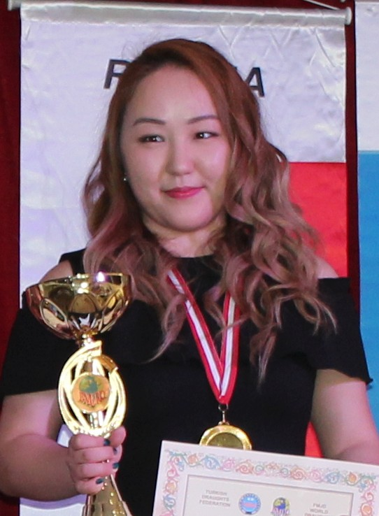 Matrena Nogovitsõna 2017. aasta välkkabe maailmameistrina.